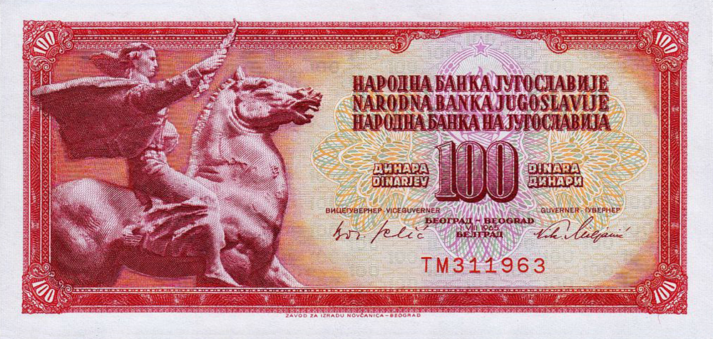 100 Yugoslav dinar (1968) - obverse